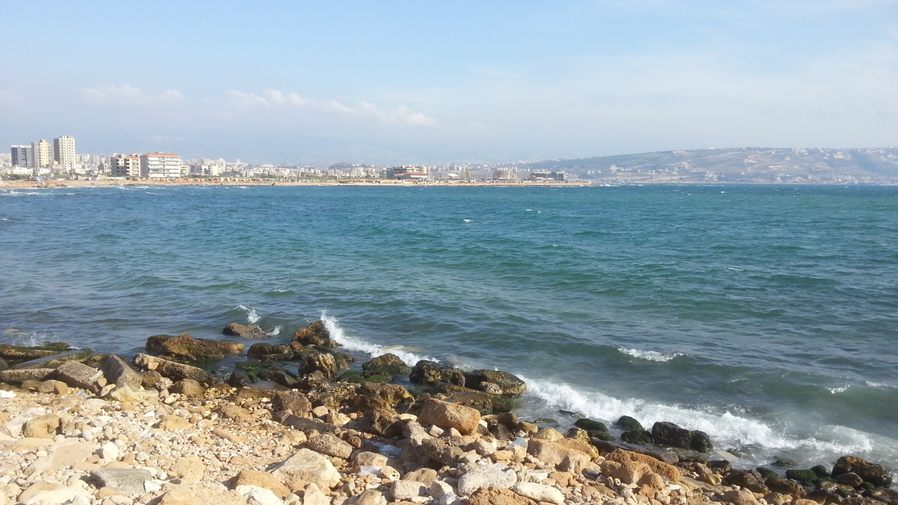 مشهد من ساحل طرابلس شمال لبنان